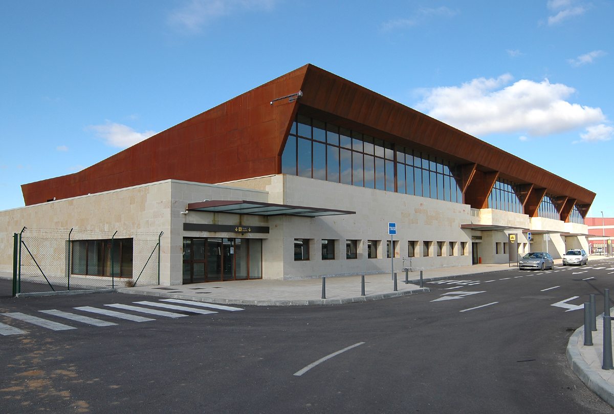 Fachada del Aeropuerto de Salamanca. Imágen tomada el 18 de Diciembre de 2006,por Rafael Álvarez Cacho.